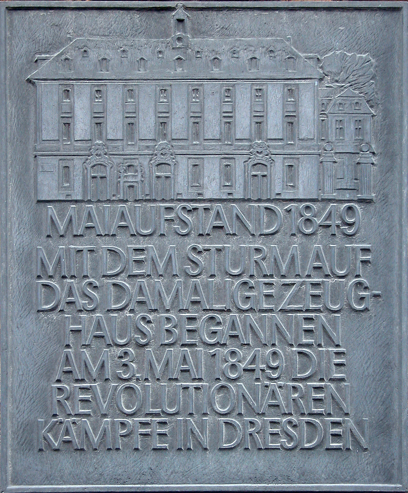 21.02.2010 01067 Dresden, Georg-Treu-Platz: Gedenktafel an den Maiaufstand von 1849 am Westgiebel des Albertinums, ehemals Zeughaus. [DSCN40395.TIF]20100221010DR.JPG(c)Blobelt